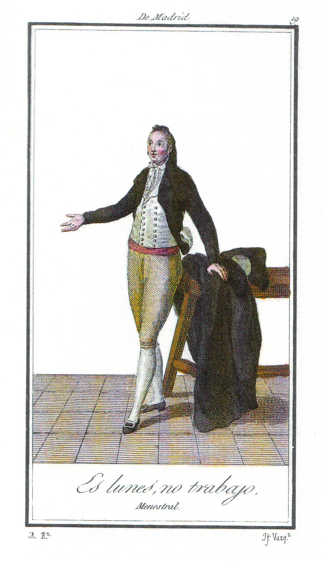 Antonio Rodríguez (1765–1823) Alternative names Antonio RodríguezDescriptionSpanish engraver and painterDate of birth/death 1765 1823 Location of birth/death Valencia ValenciaWork location Madrid. ValenciaAuthority control : Q19839243 VIAF: 99638871 ISNI: 0000 0001 0928 4589 ULAN: 500037980 LCCN: n83012058 GND: 143185209 WorldCat creator QS:P170,Q19839243 (Valencia, 1765 - Madrid, ca. 1825); Grabado y dibujado por Antonio Rodríguez; publicado en 1801. Reproducción facsímil de treinta y ocho estampas, más catorce variantes, de los Trajes de Madrid. Todas iluminadas. Introducción de Juan Carrete Parrondo, Madrid (1989). ISBN 84 78120696.